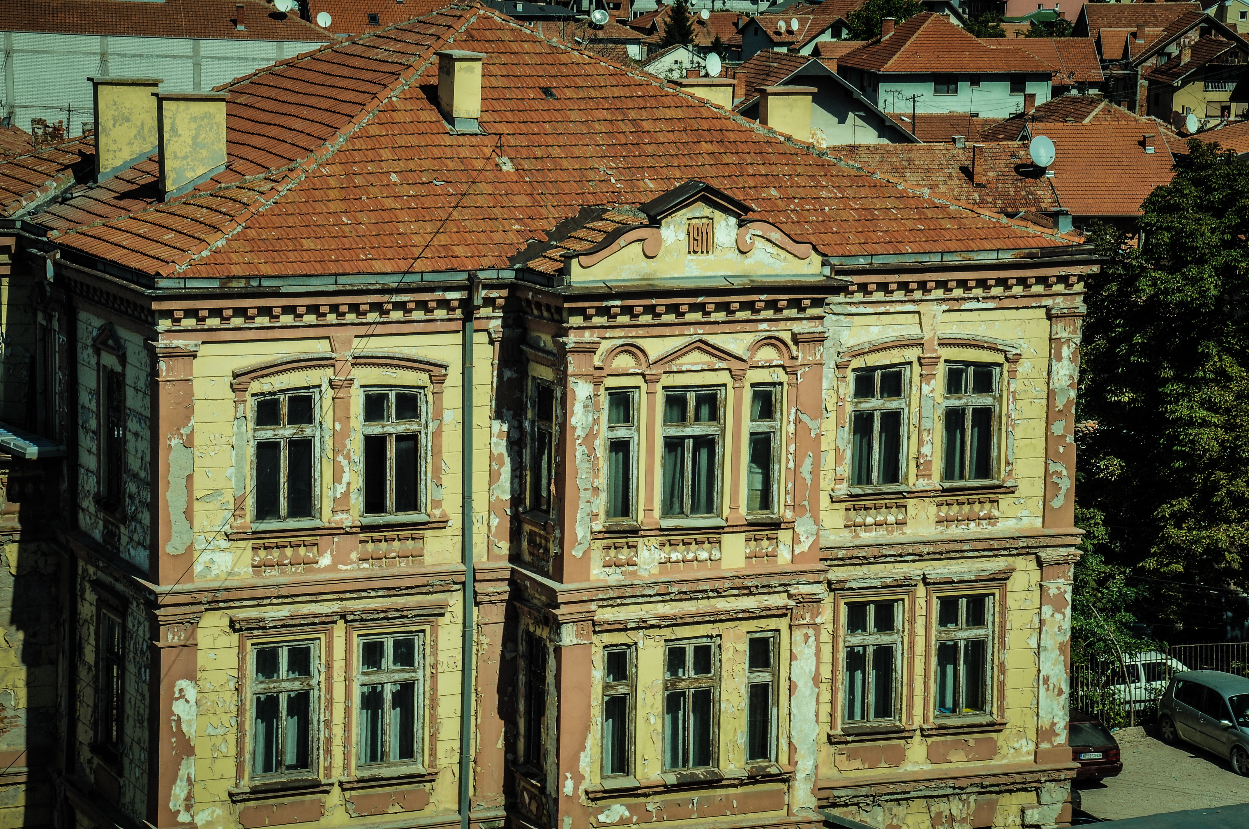 Управна зграда „УНИПРОМА“ у Новом Пазару